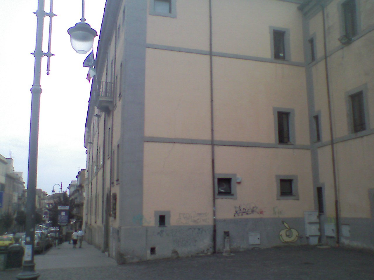 Marino, il palazzo dell'Istituto d'Arte.